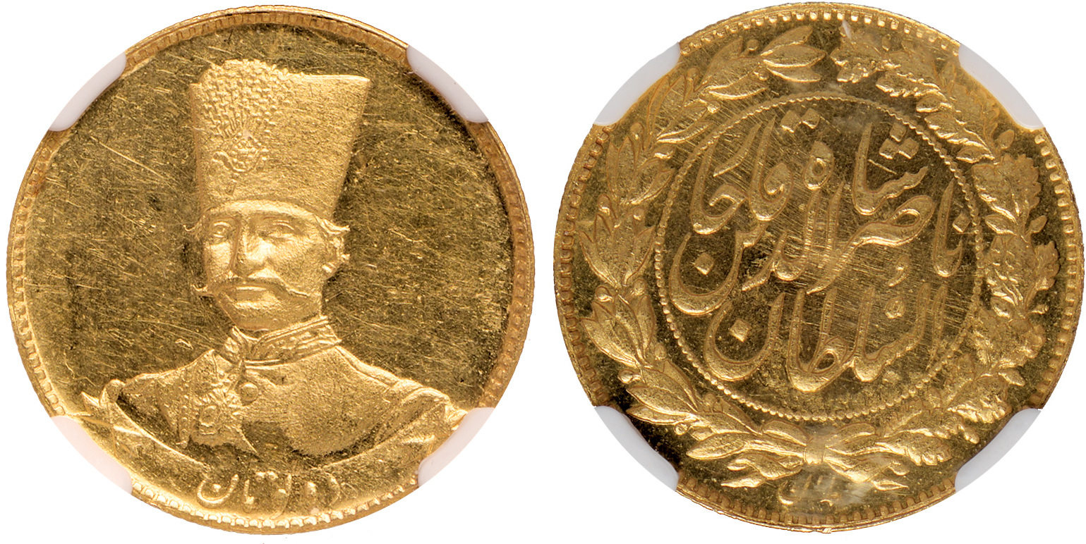 سکه دو تومانی ناصرالدین شاه قاجار